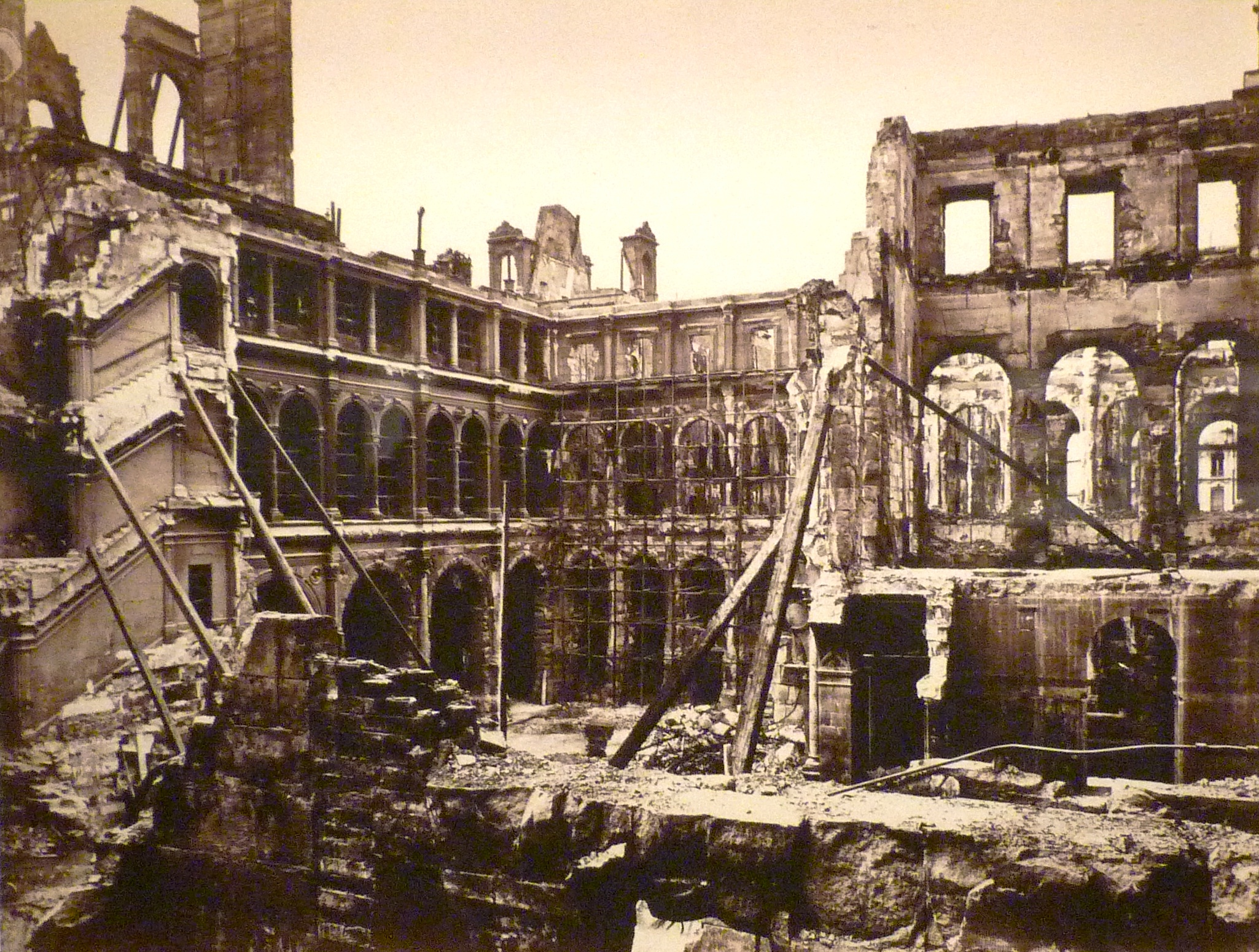 Exposition La Commune de Paris à l'Hôtel de Ville de Paris (18 mars - 28 mai 2011) - Hôtel de Ville après l'incendie, cour intérieure.